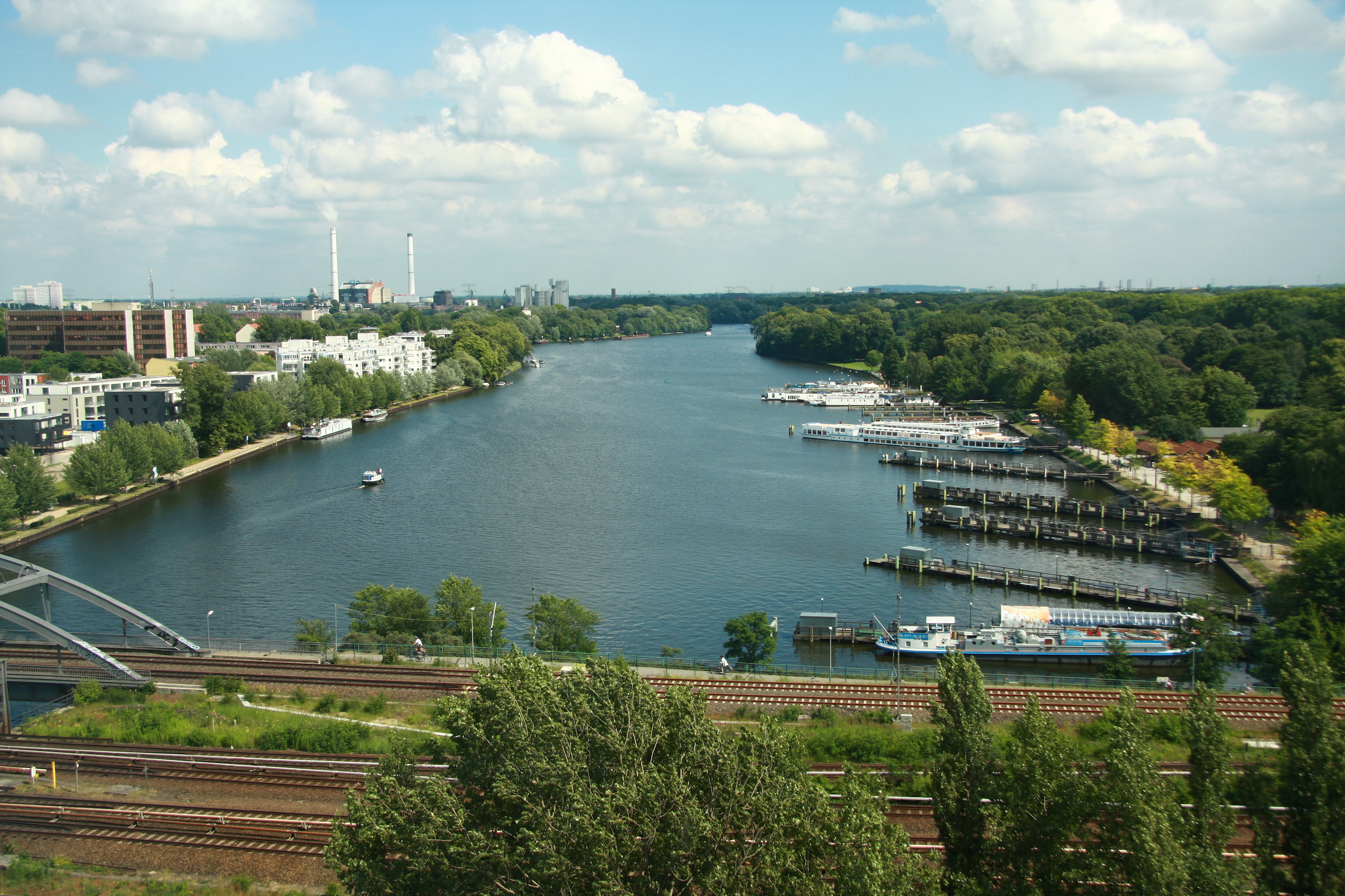 Die Schiffsanleger in Berlin-Treptow, links die Halbinsel Stralau, rechts Alt-Treptow